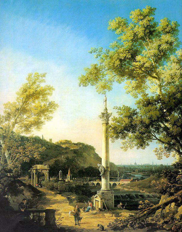 Capriccio